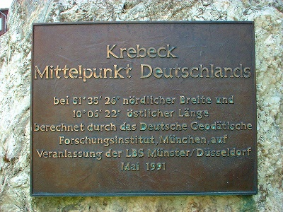 Das Schild auf dem Mittelpunktstein, welches die Koordinaten des geographischen Mittelpunktes Deutschlands (Krebeck) angibt.